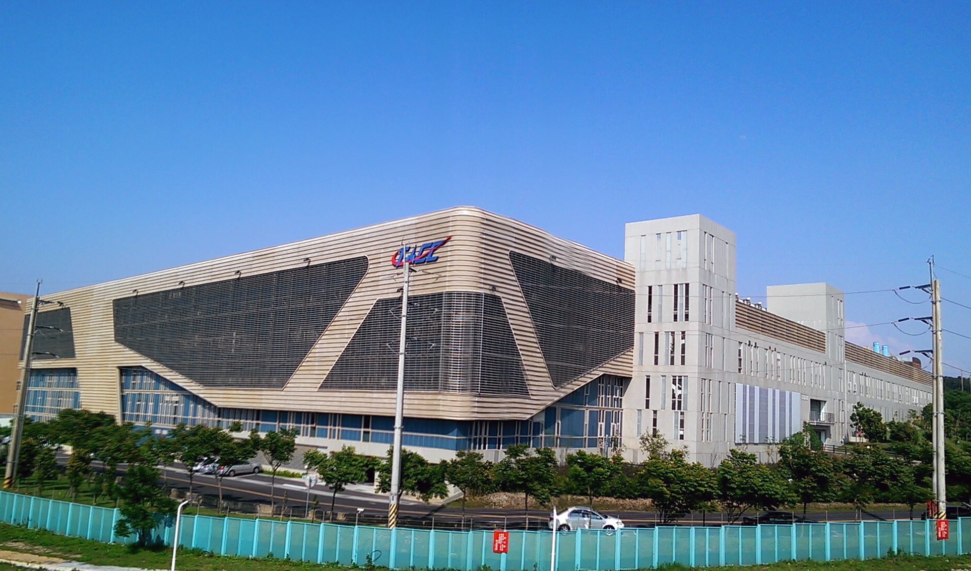 中文（台灣）: 漢翔航空工業台灣先進複材中心